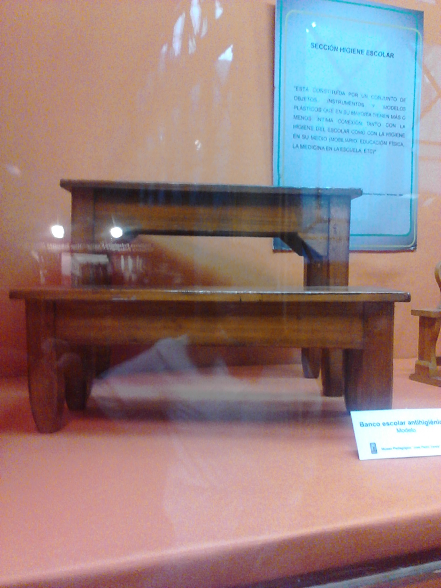 Banco anti-higiénico anterior a la reforma vareliana